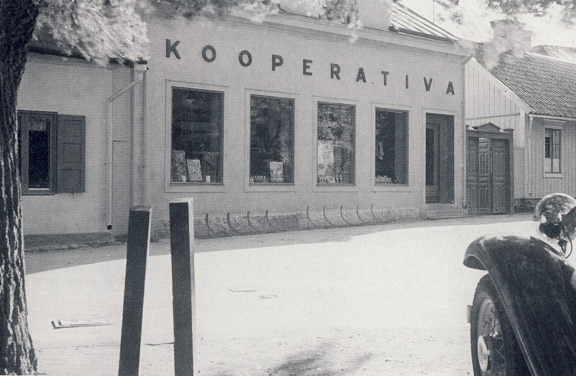 Butik för Sigtunas kooperativa handelsförening, Sverige